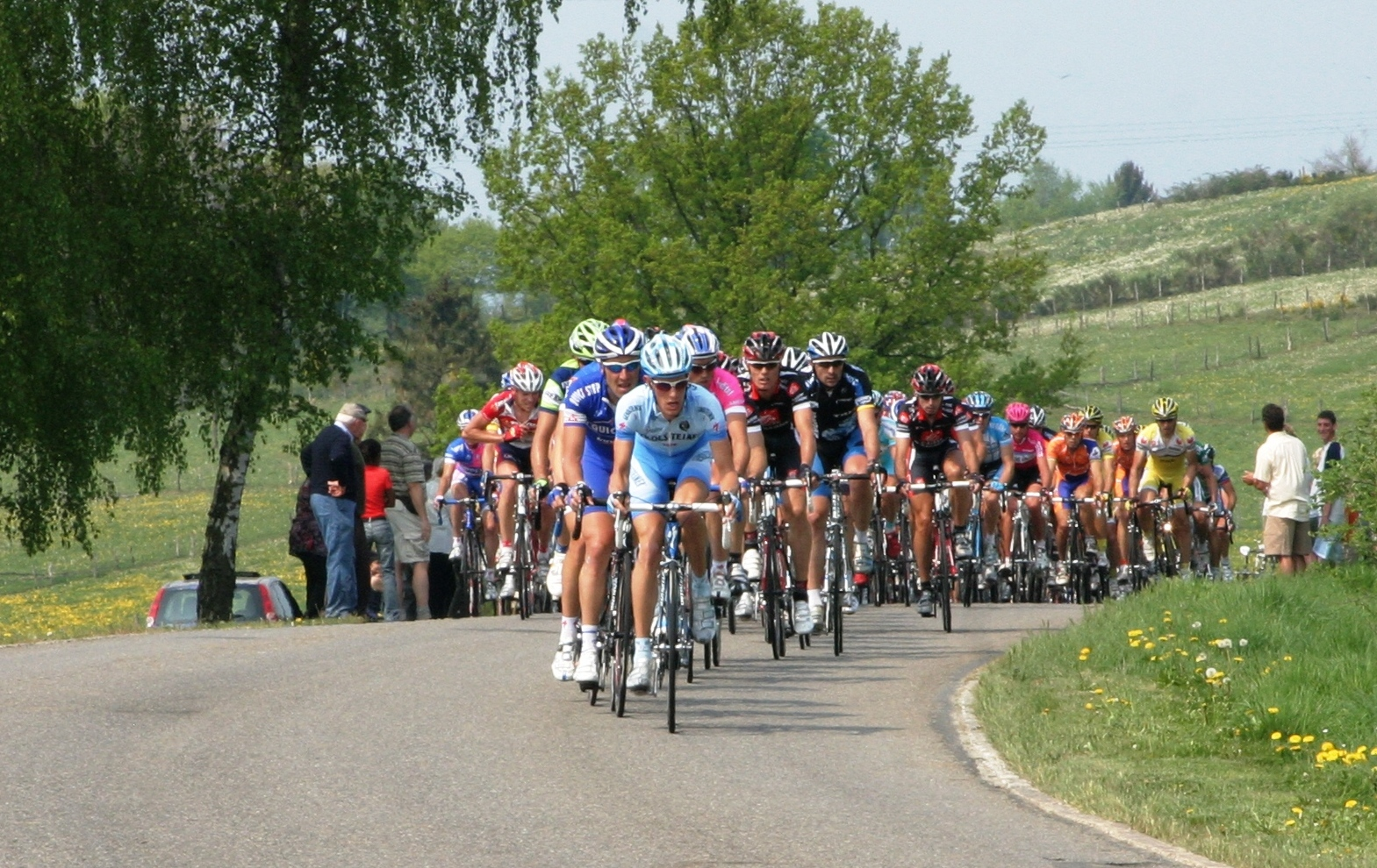 Liège-Bastogne-Liège 2007. De Plotto am Stouss vun Tavigny.